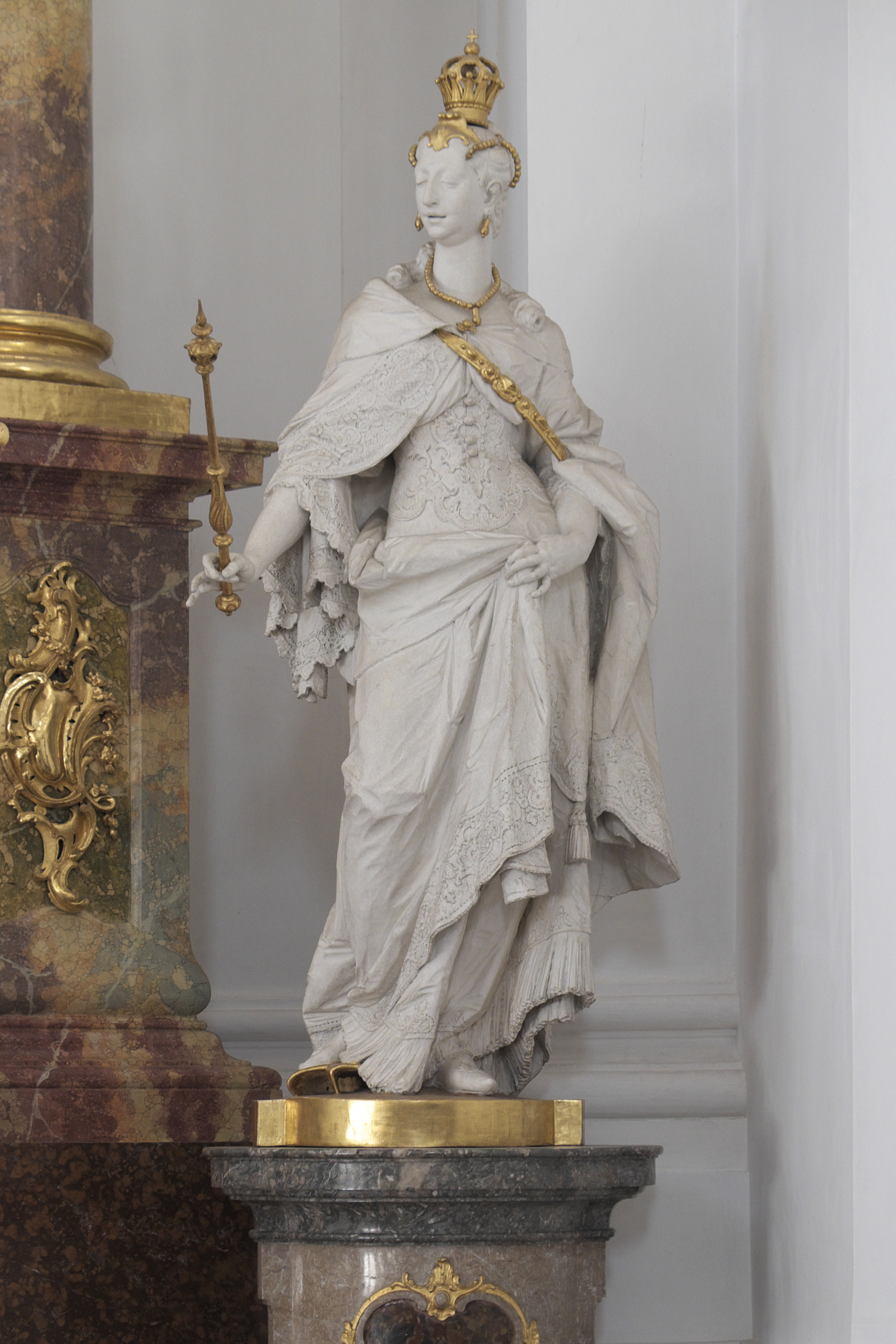 Katholische Pfarrkirche St. Marinus und Anianus, ehemalige Abteikirche des Benediktinerklosters Rott in Rott am Inn im Landkreis Rosenheim (Bayern/Deutschland), Hauptaltar